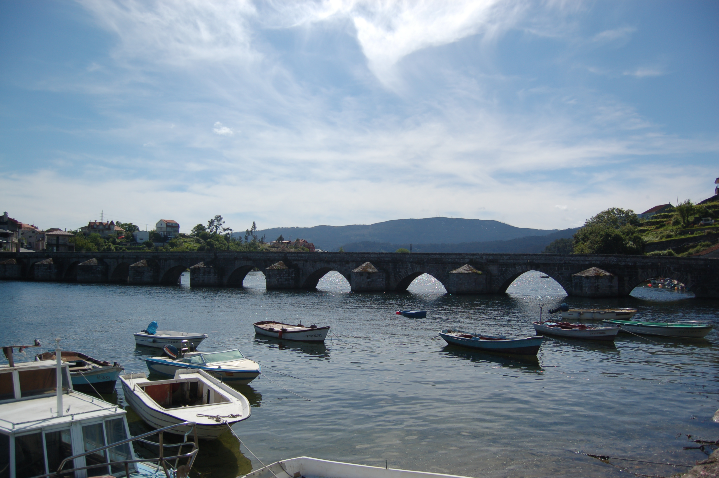 Ponte romana sobre o río Verdugo, entre Ponte Sampaio (Pontevedra) e Arcade (Soutomaior)